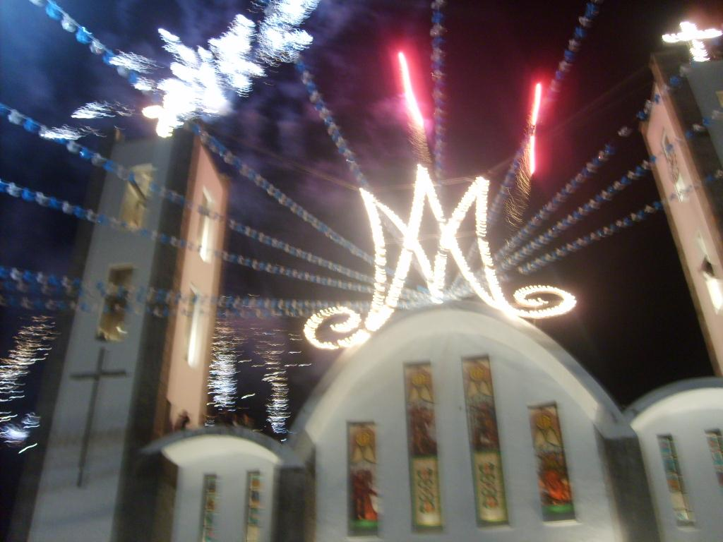 Pirotecnia estallando al salir la procesión de la Virgen dela Caridad. Huamantla, Tlaxcala.